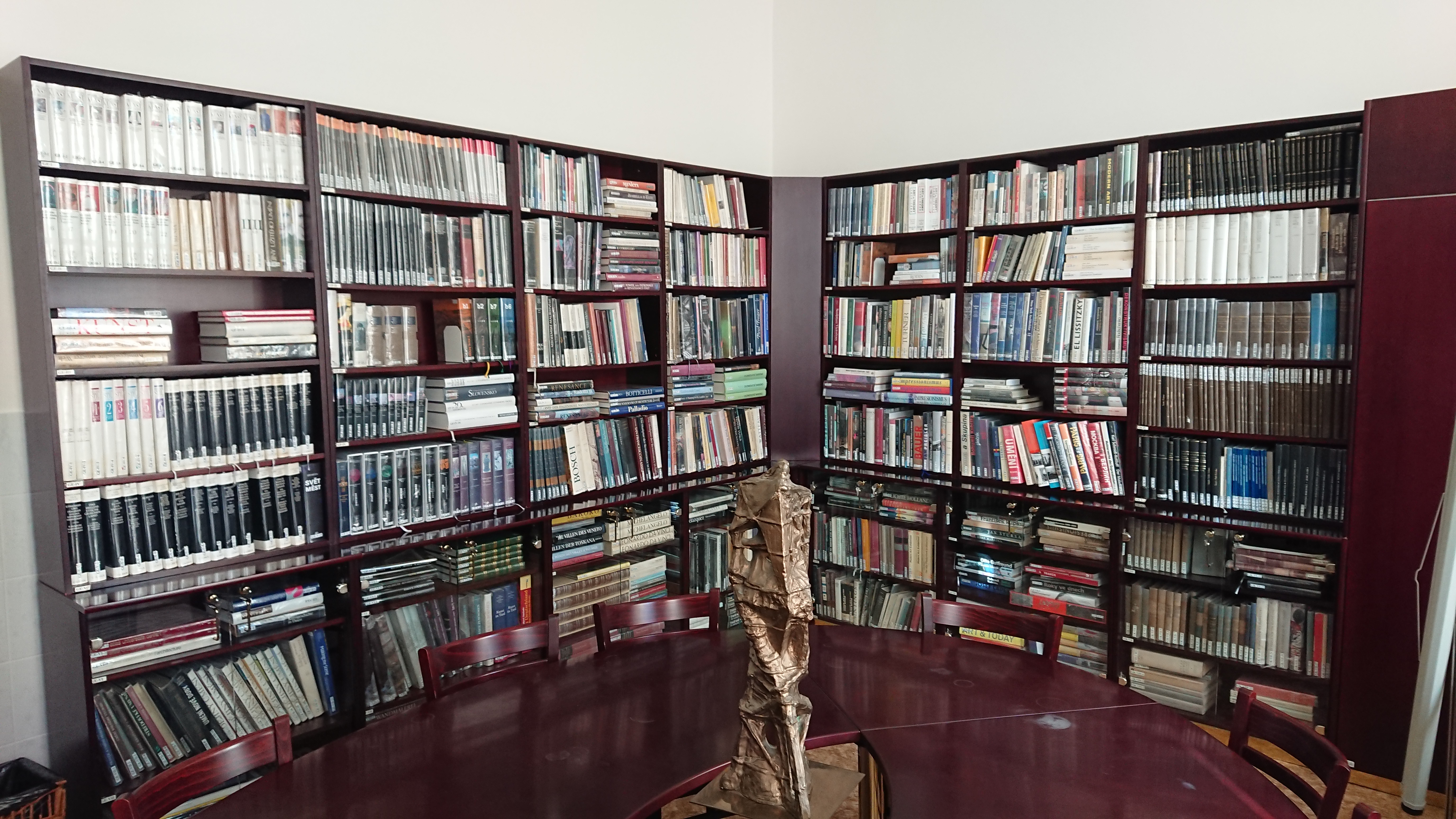 Gettyho knihovna, jedna ze studoven Semináře dějin umění Masarykovy univerzity. Uprostřed stolu plastika Mnémosyné od Nikose Armutidise z roku 1994.